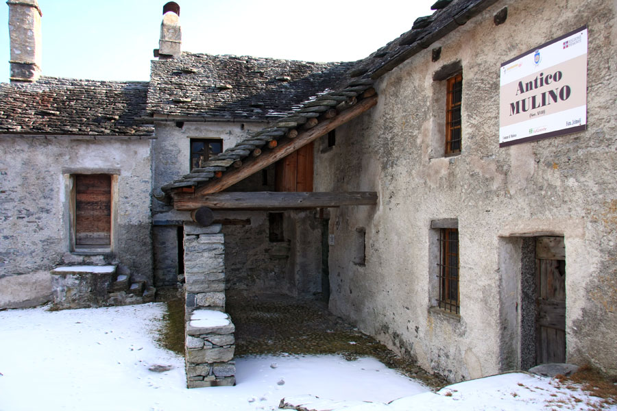 Antico Mulino, Malesco